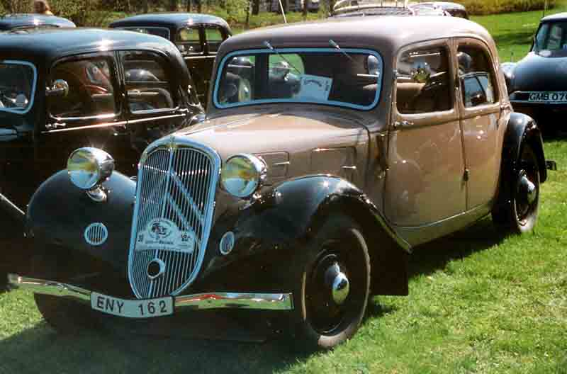 Citroen 7 Berline Legere 1934